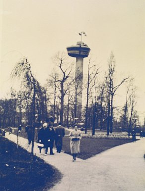 De euromast in Rotterdam in 1960. De foto is door m'n opa of m'n moeder gemaakt. (public domain)